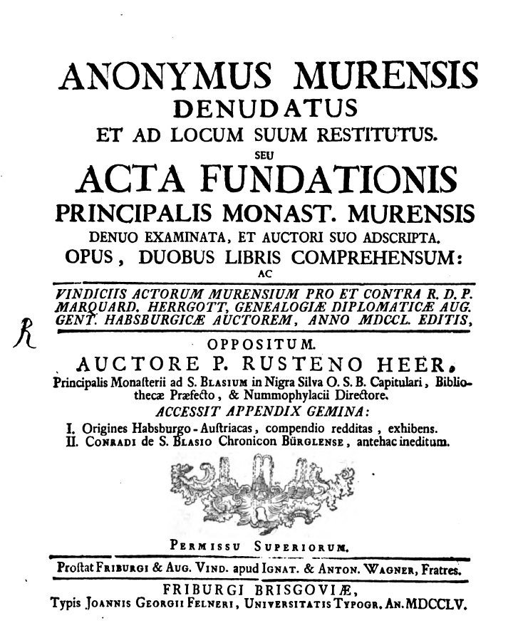 Titel des Anonymus Murensis denatus